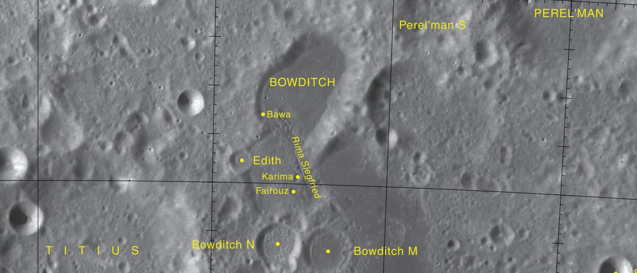 Cráter lunar Bowditch y sus cráteres anexos. (Imagen LRO)